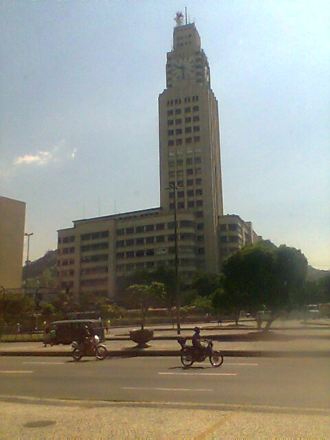 Estação Central do Brasil, Rio de Janeiro, Brasil